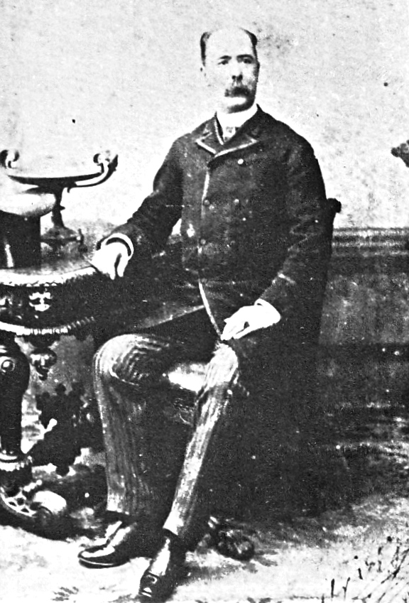 Manuel Yrigoyen Arias (1829-1912) diplomático y político peruano. Canciller, primer ministro y ministro de Hacienda. Fue el canciller que recibió la declaratoria de guerra de parte de Chile, el 5 de abril de 1879.